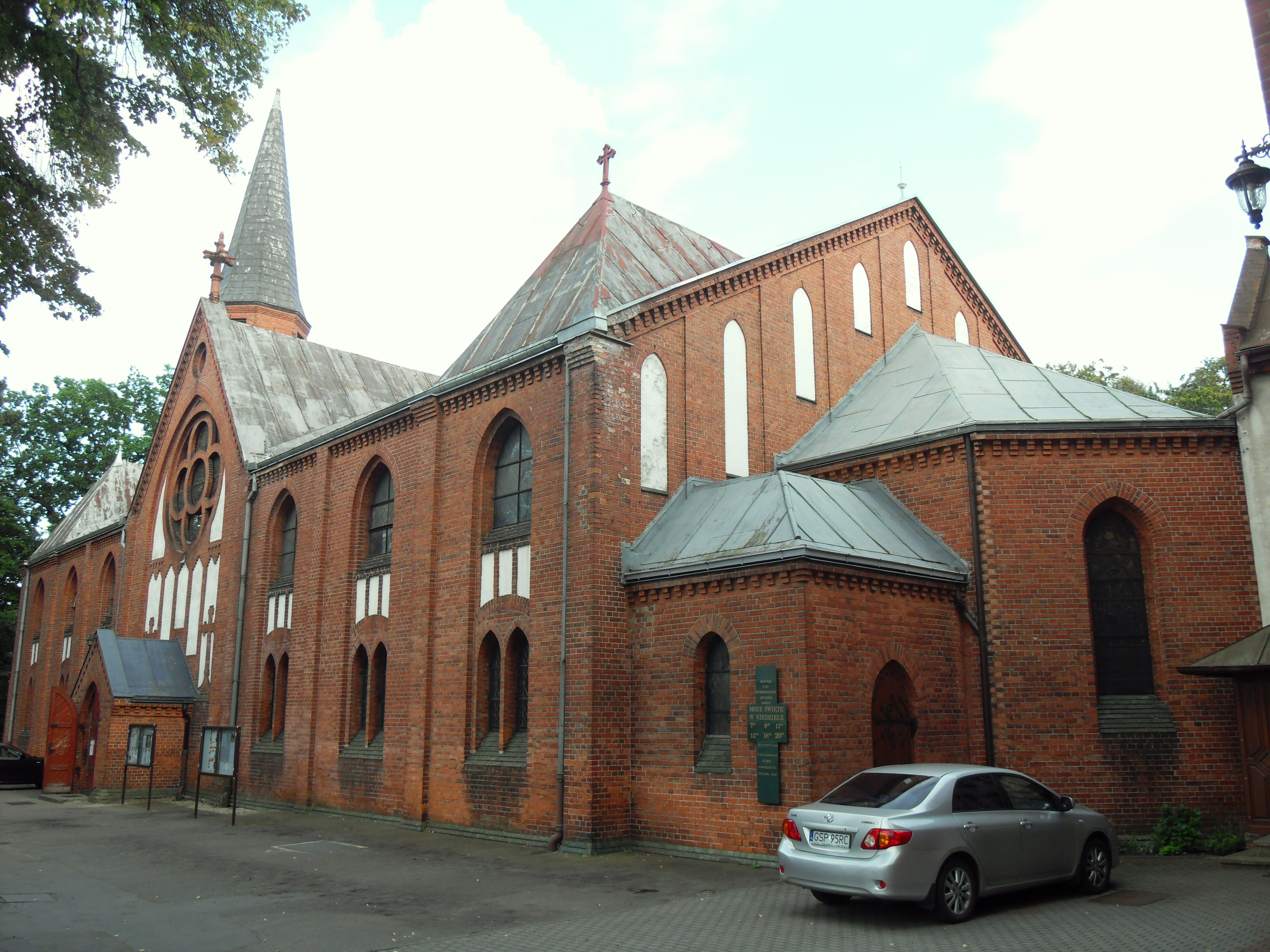 Sopot, ul. Kościuszki 19-21 - rzymskokatolicki kościół parafialny pw. Najświętszej Maryi Panny Wniebowziętej - Gwiazda Morza.